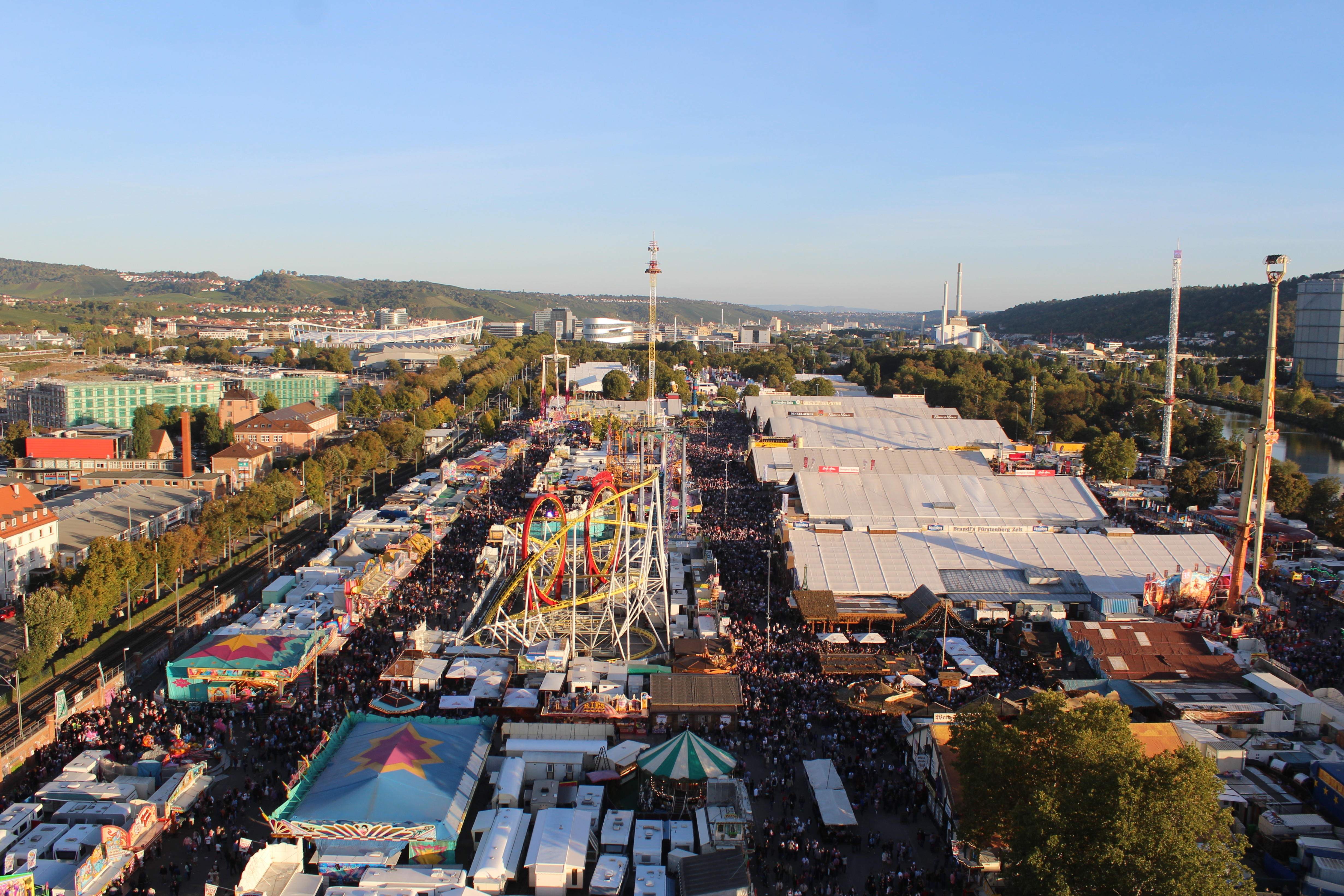 Blick vom Riesenrad auf das Cannstatter Volksfest 2018